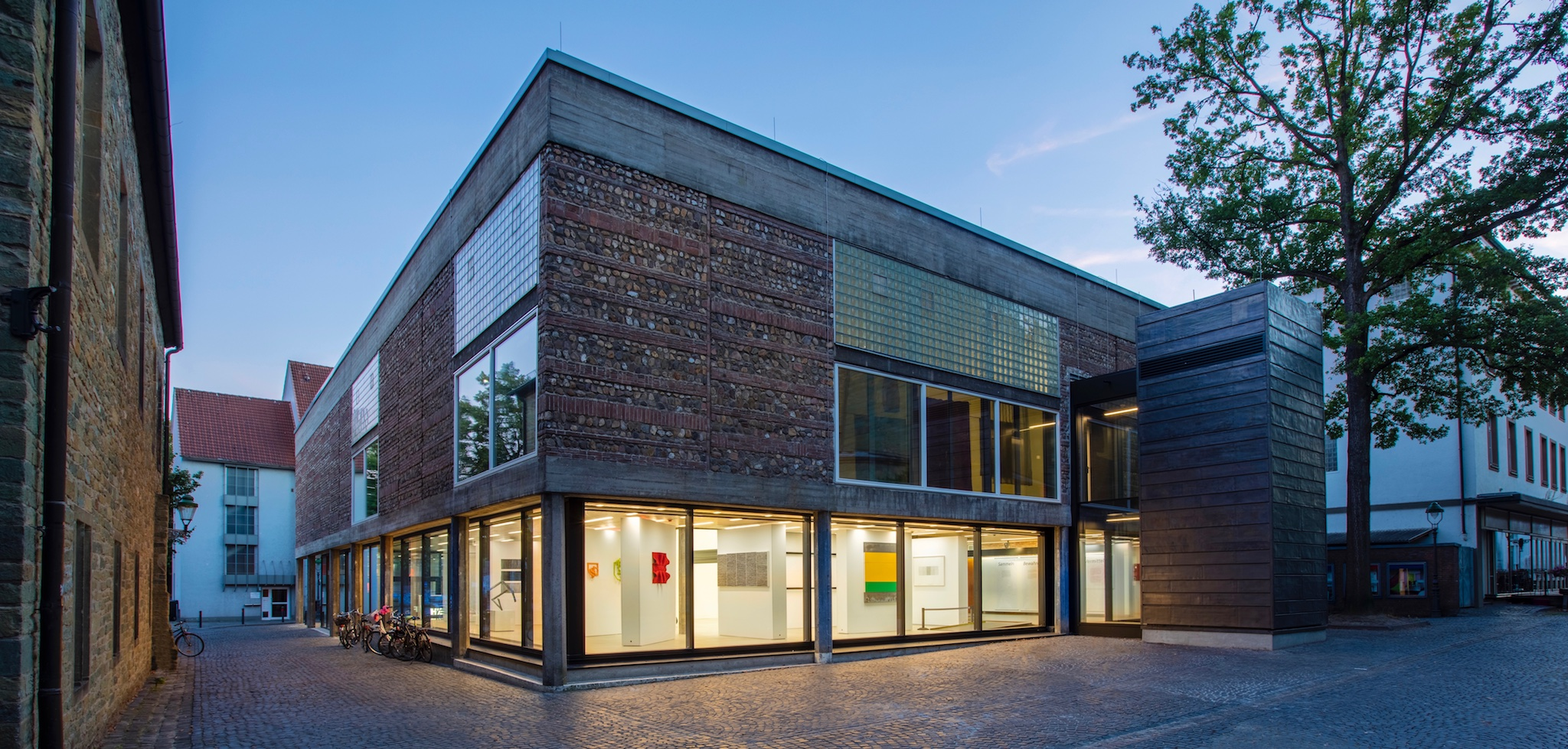 Ansicht RAUM SCHROTH im Museum Wilhelm Morgner